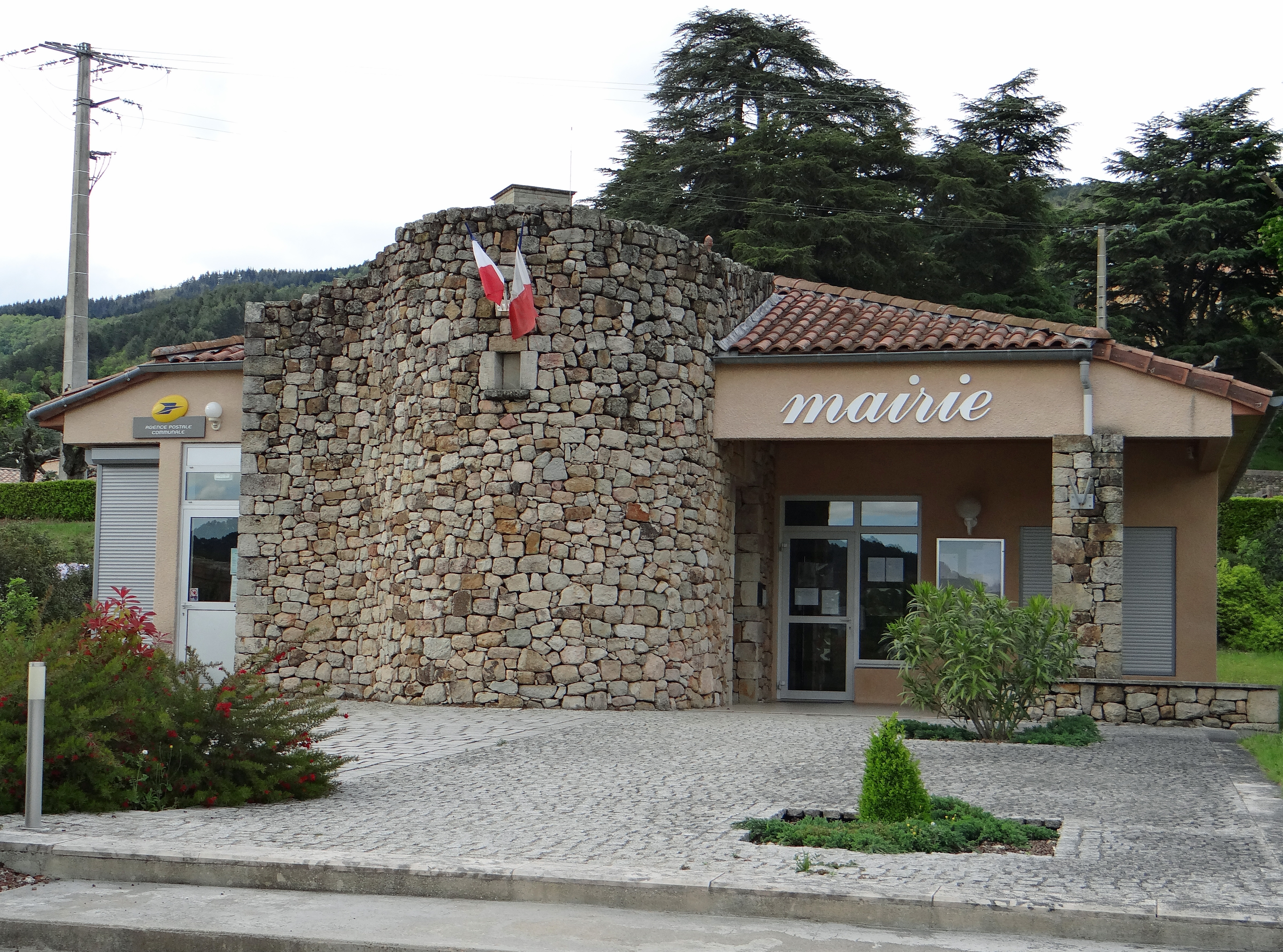 Rocher (Ardèche) - La mairie